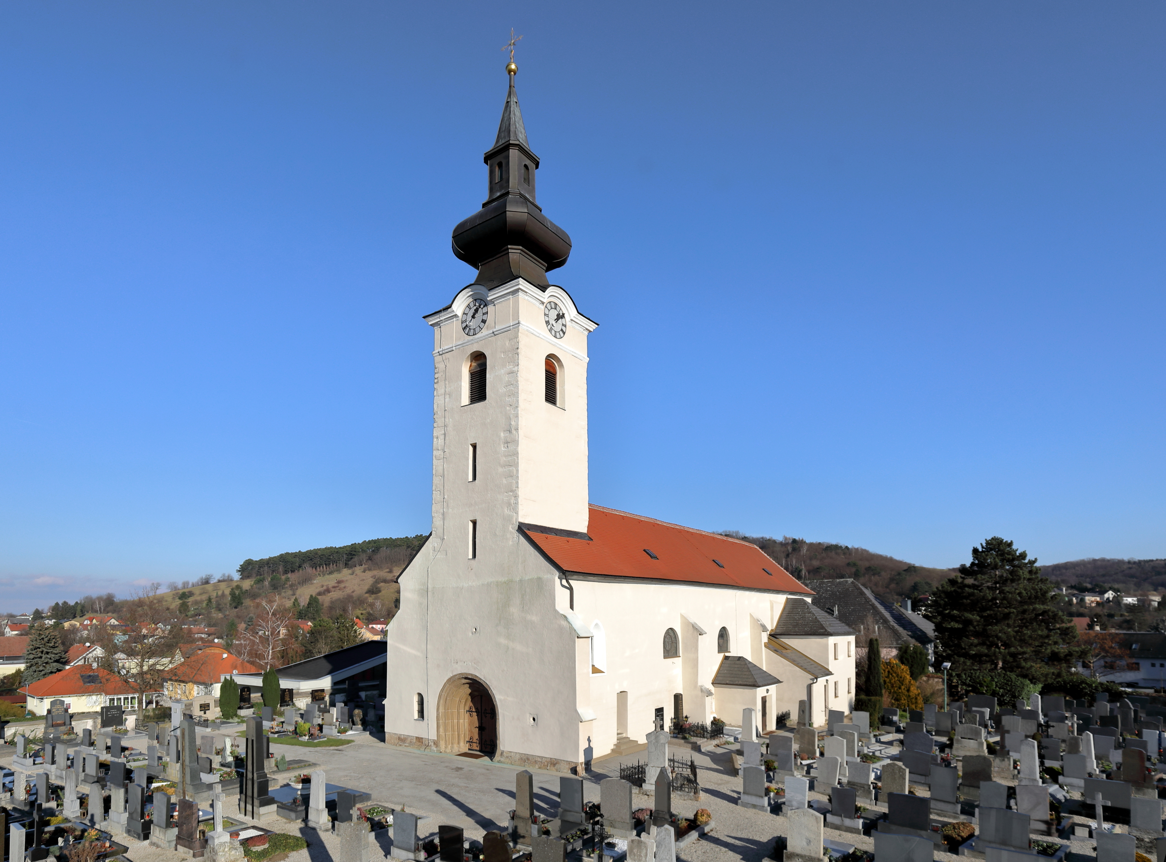 Südwestansicht der röm.-kath. Pfarrkirche Pfarrkirche hl. Margaretha in der niederösterreichischen Marktgemeinde Sieghartskirchen.Die Kirche ist auf einer Anhöhe errichtet und von einem Friedhof mit Befestigungsmauer umgeben. Die im Kern spätromanische und gotisch überbaute Saalkirche hat einen mächtigen romanischen Westturm sowie einen polygonal geschlossenen Chor.